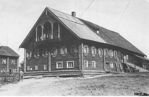 Сенная губа.Олонецкая губерния